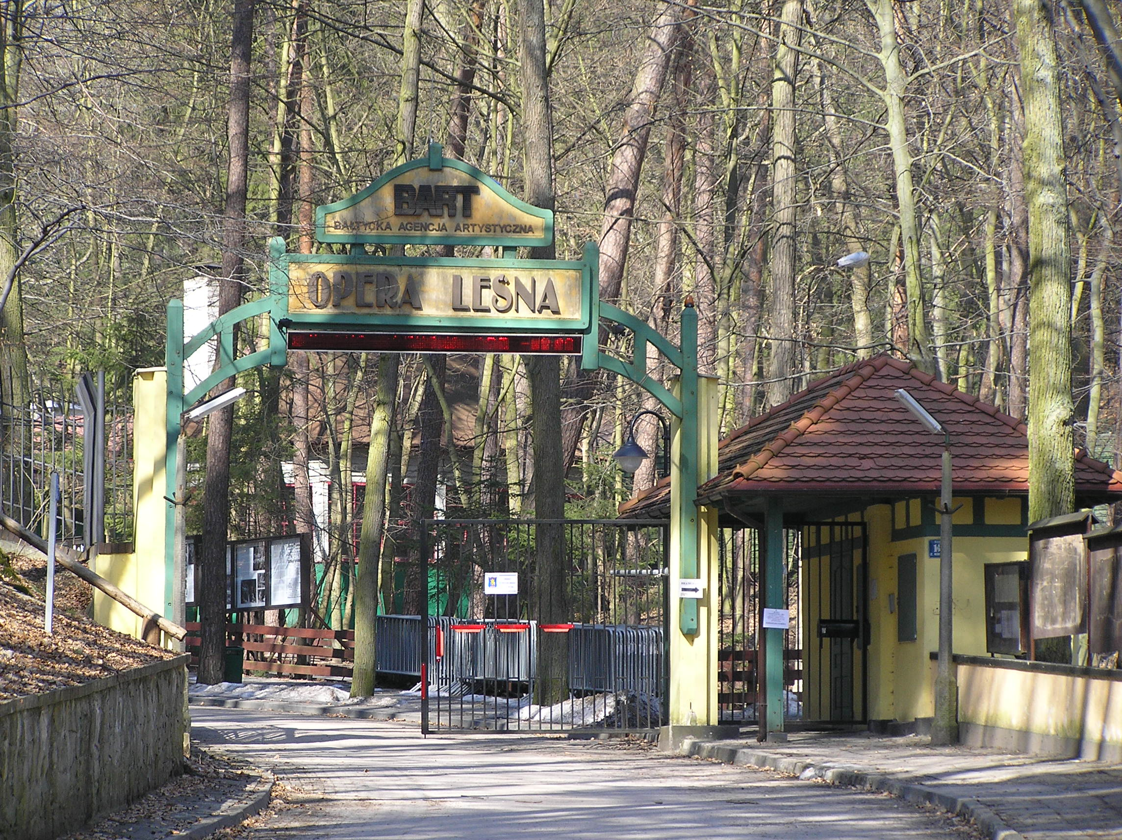 Entrance Opera Lesna Sopot (Polska) - Eingang Waldoper Zoppot (Polen)